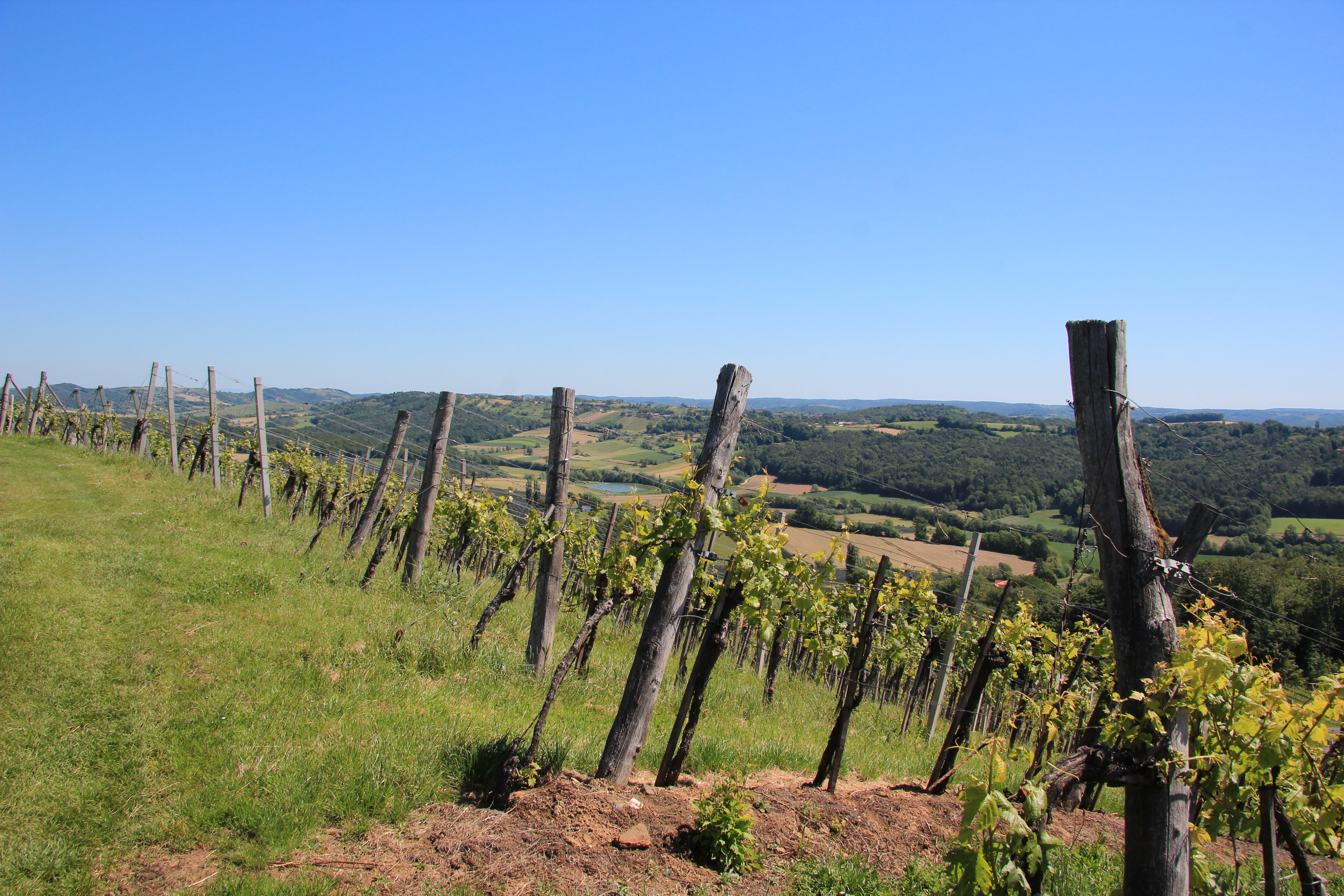 Klöch in der Südoststeiermark